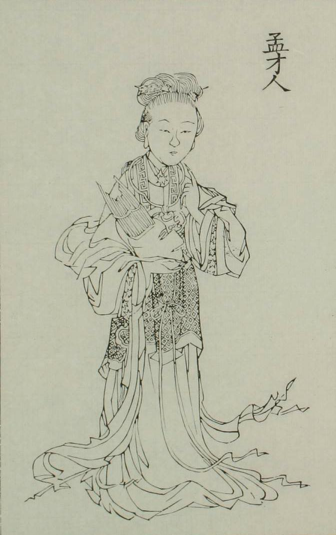 关于孟才人的图像。